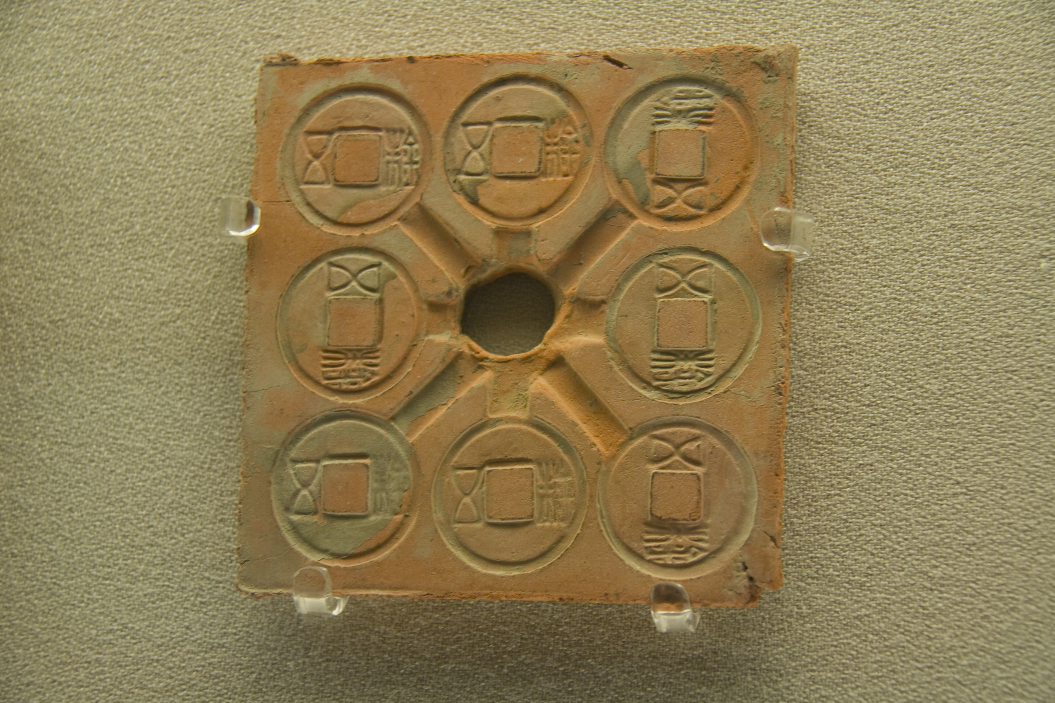 115_20100911_bt_shanghai_museum